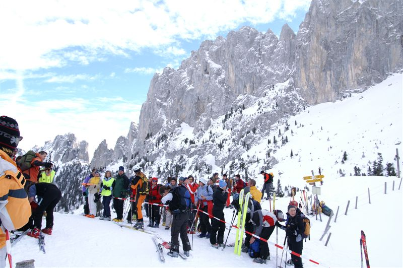 Sur le parcours du Trophée des Gastlosen, poste de contrôle du Chalet du Soldat, avec les Gastlosen à l'arrière-plan. Photo : Pascal Niquille, droits cédés au comité d'organisation de la manifestation.